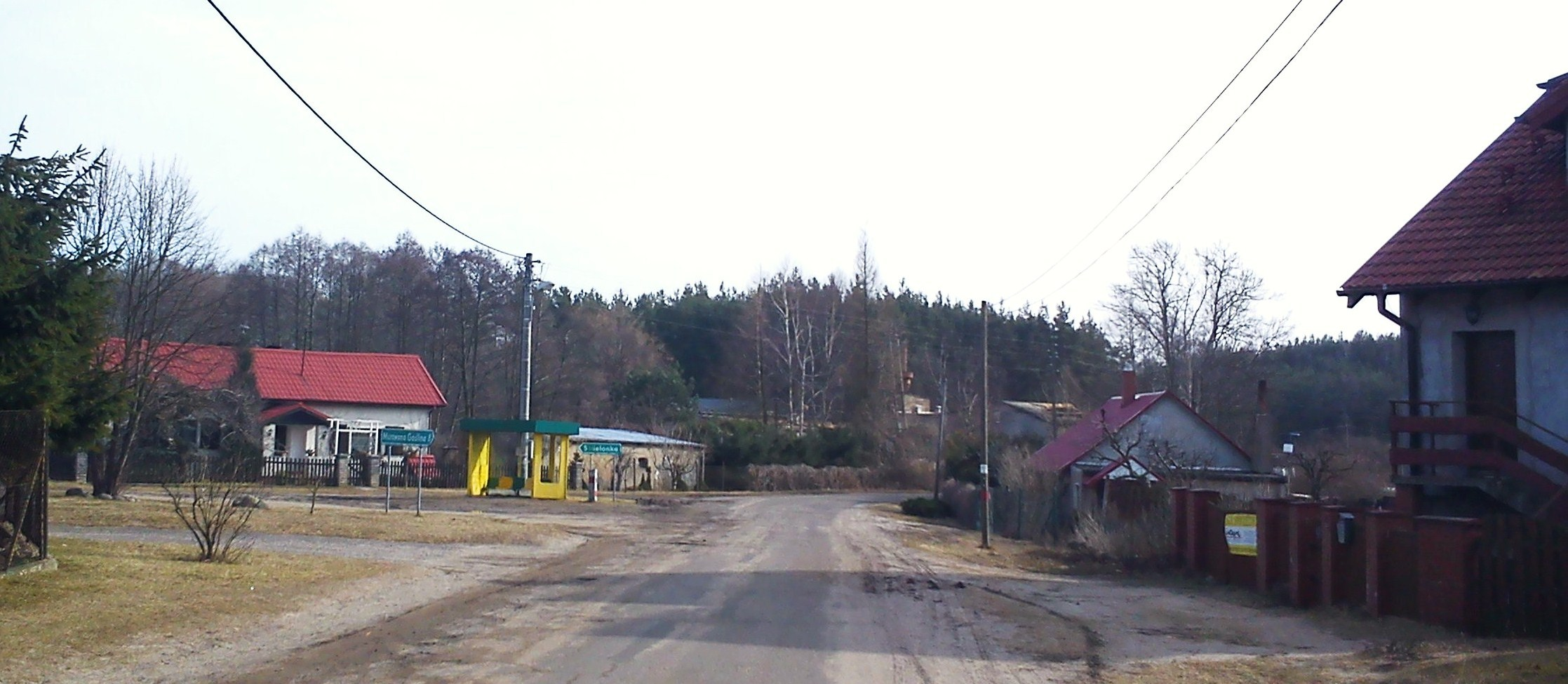 Pławno, centrum wsi.